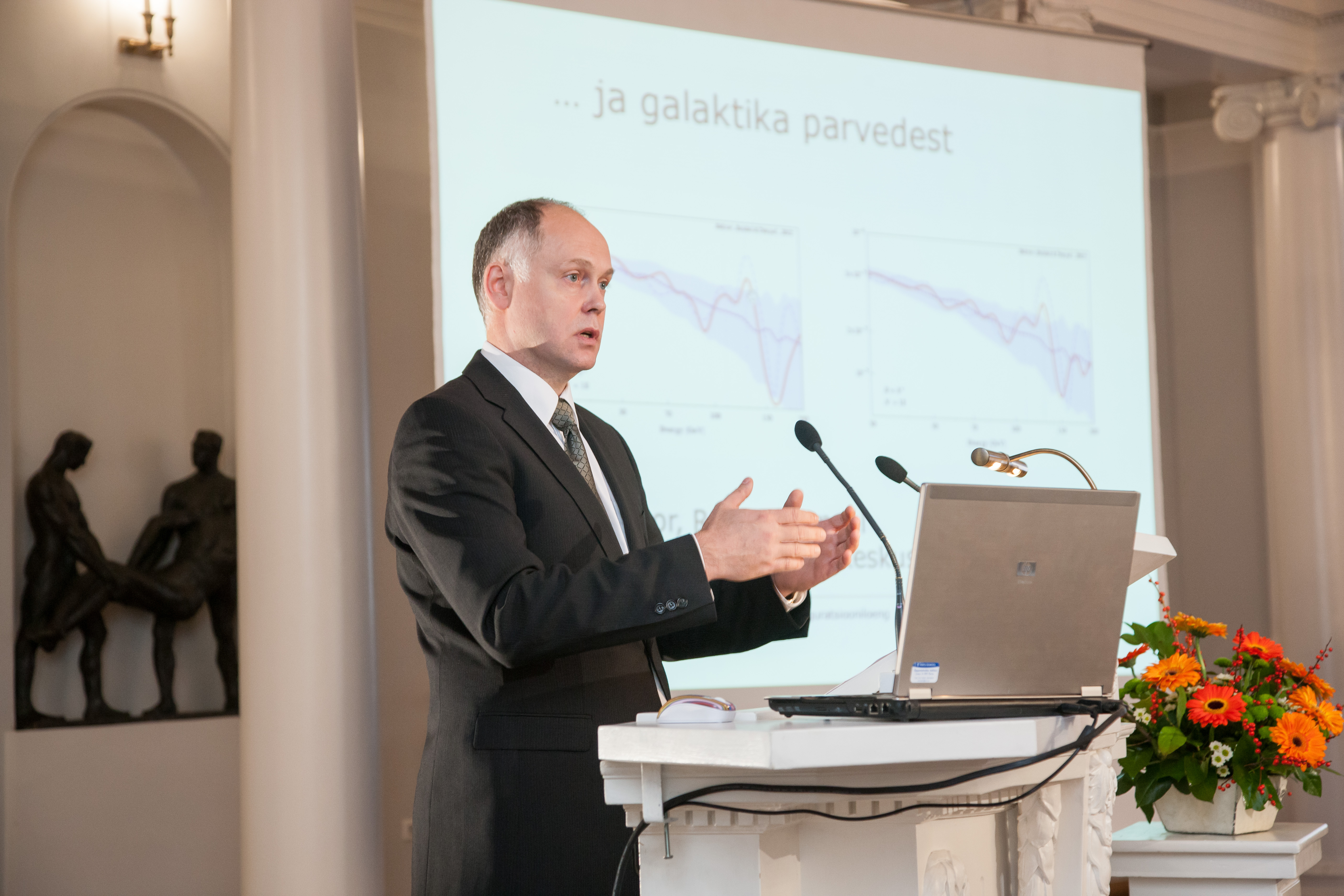 Tartu Ülikooli kõrge energia füüsika professor Martti Raidal TÜ aulas pidamas inauguratsiooniloengut teemal "Kõrge energia – tee universumi süvastruktuuri mõistmiseks".